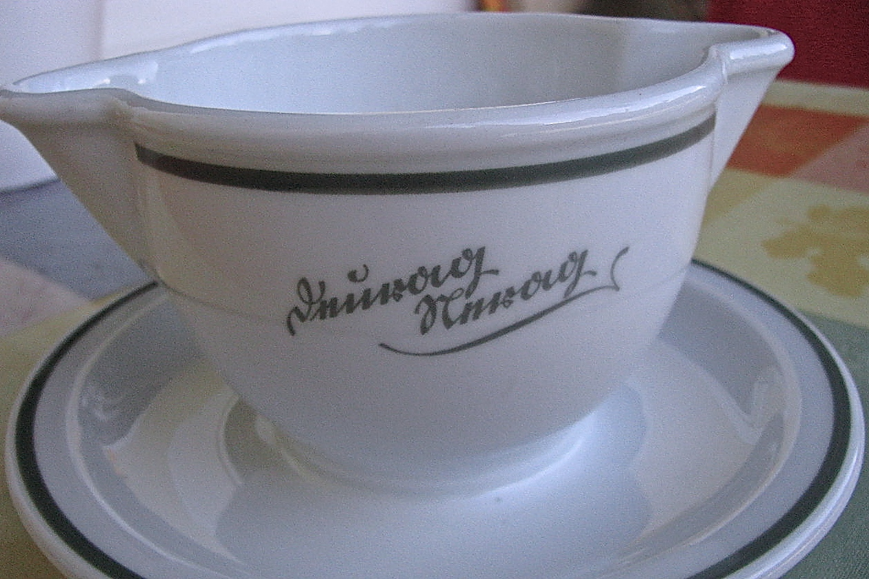 Suppentasse der Deurag-Nerag-Werke in Misburg-Anderten; Porzellan der Manufaktur Bauscher in Weiden. Produziert in der NS-Zeit ...